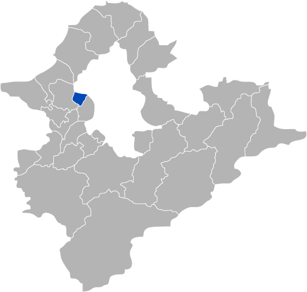 KaurJmeb為編輯臺灣省臺北縣蘆洲市，於2005年2月8日所繪。